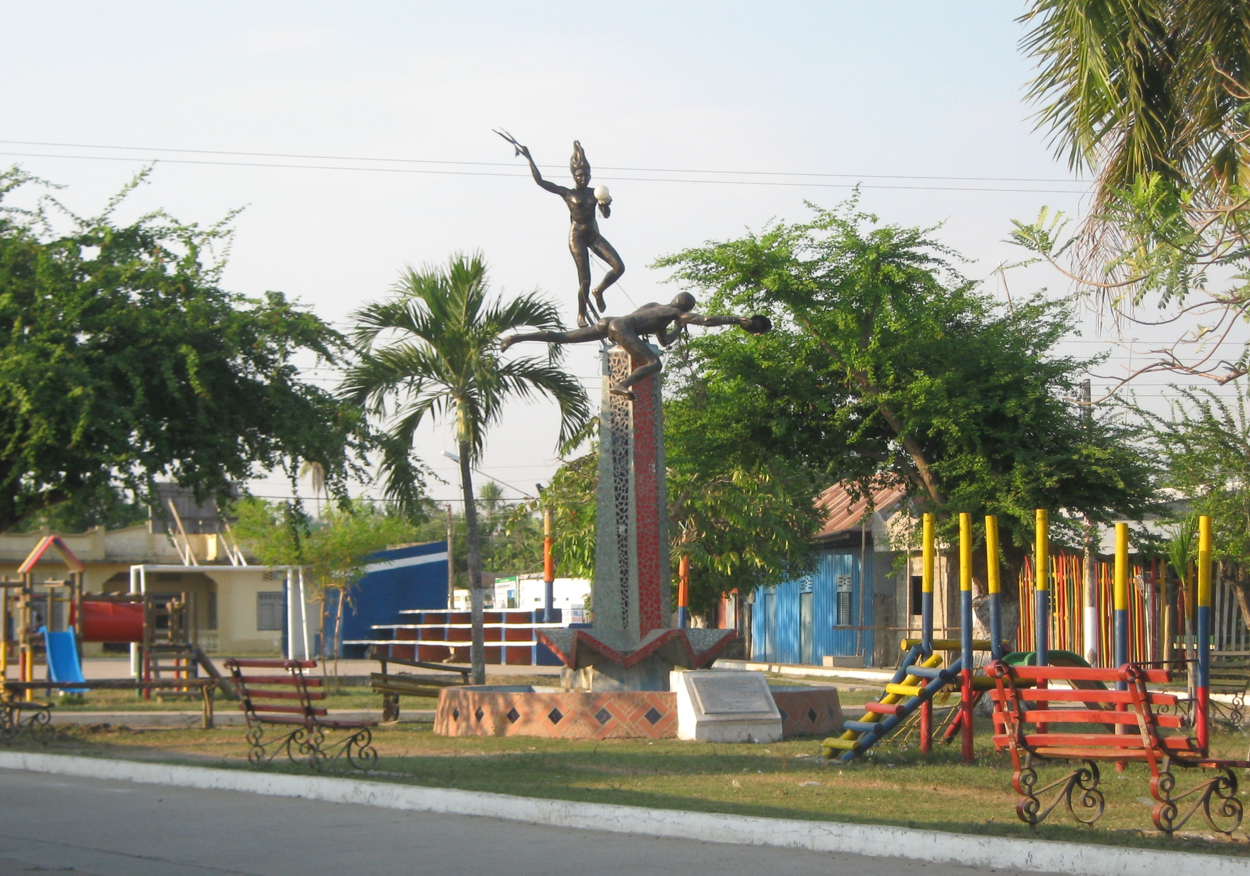 Pinillos Bolivar Colombia